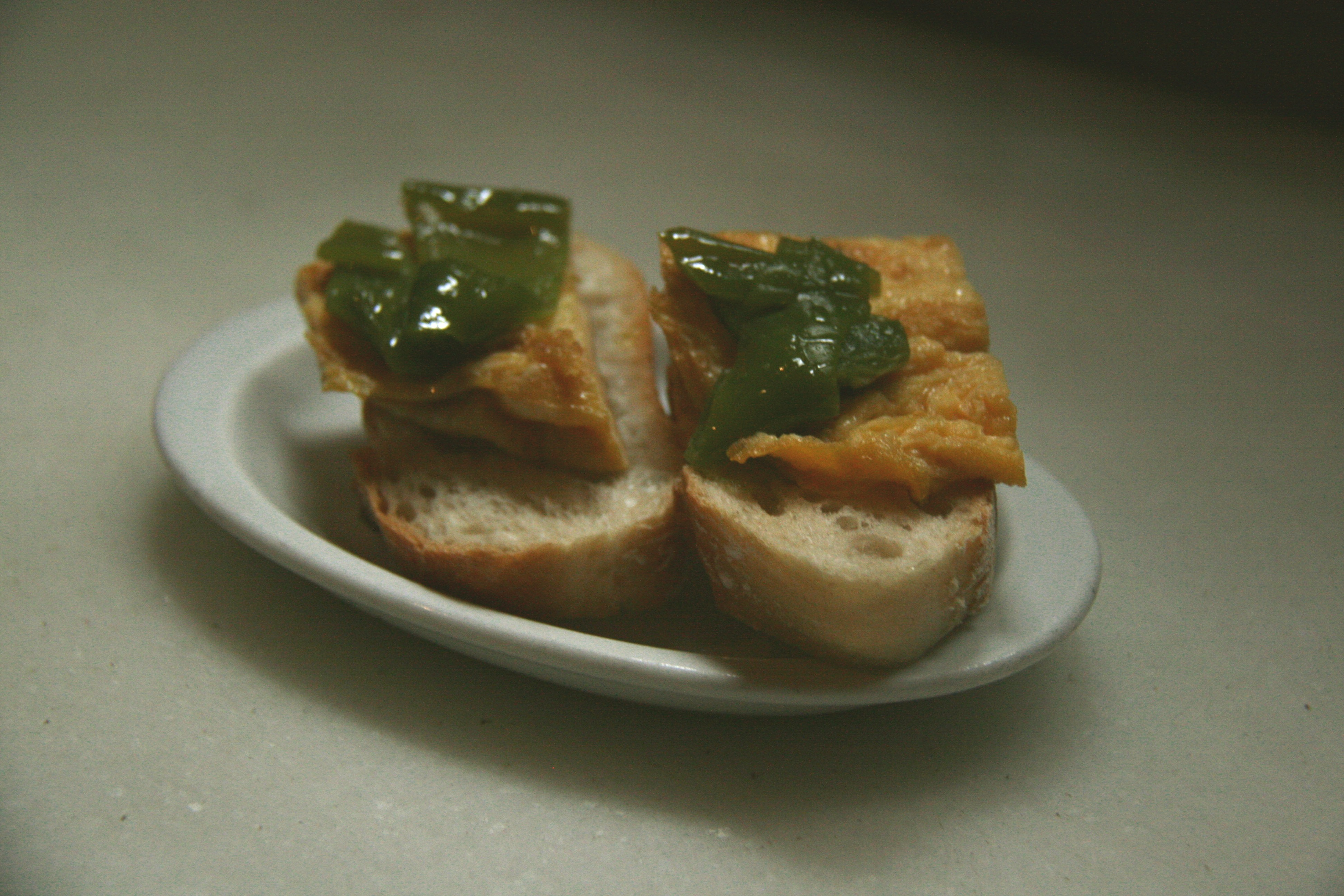 Tapa de tortilla francesa y pimiento verde